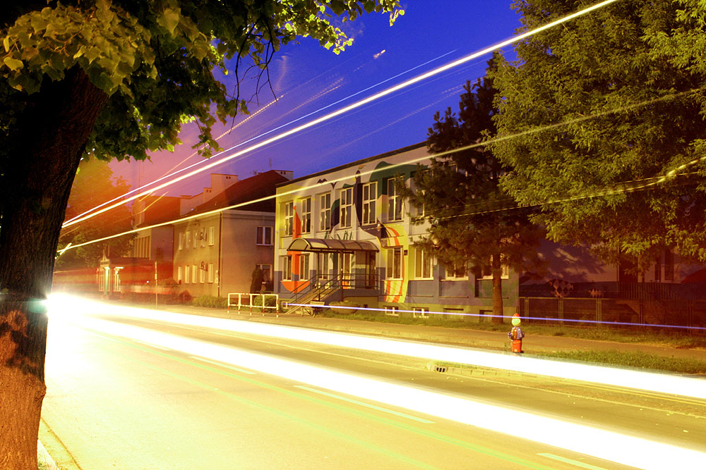 Tarnobrzeg, ul. Sokola.